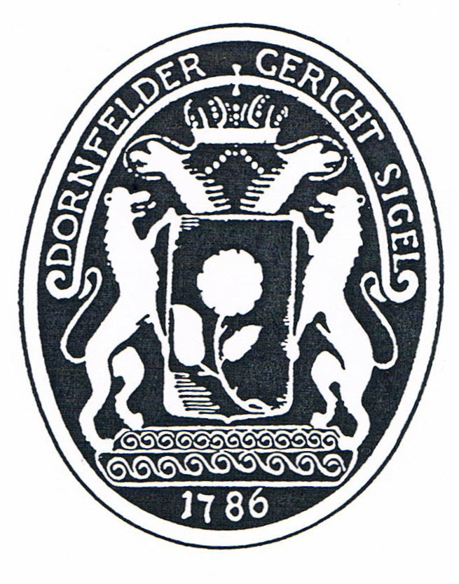 Dornfelder Gericht Sigel